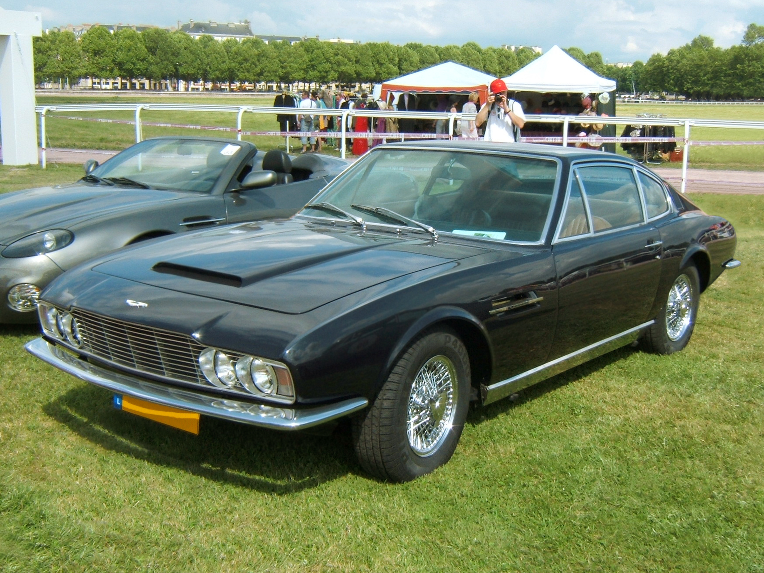 Aston Martin DB S de 1969, avant.